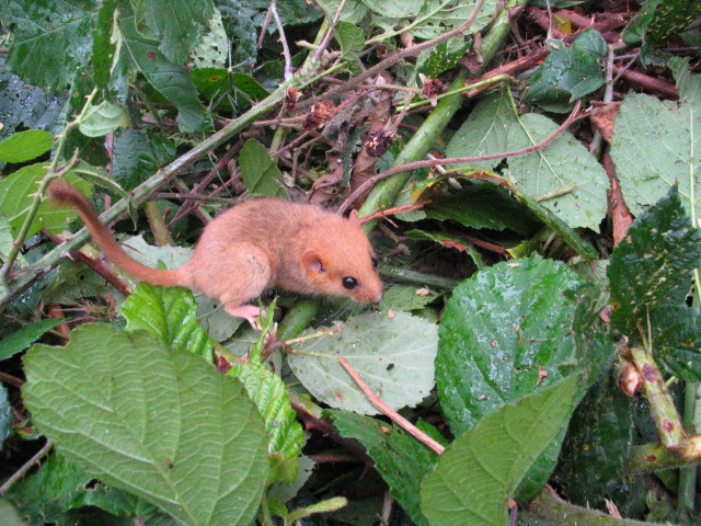 Muscardinus avellanarius, muscardin